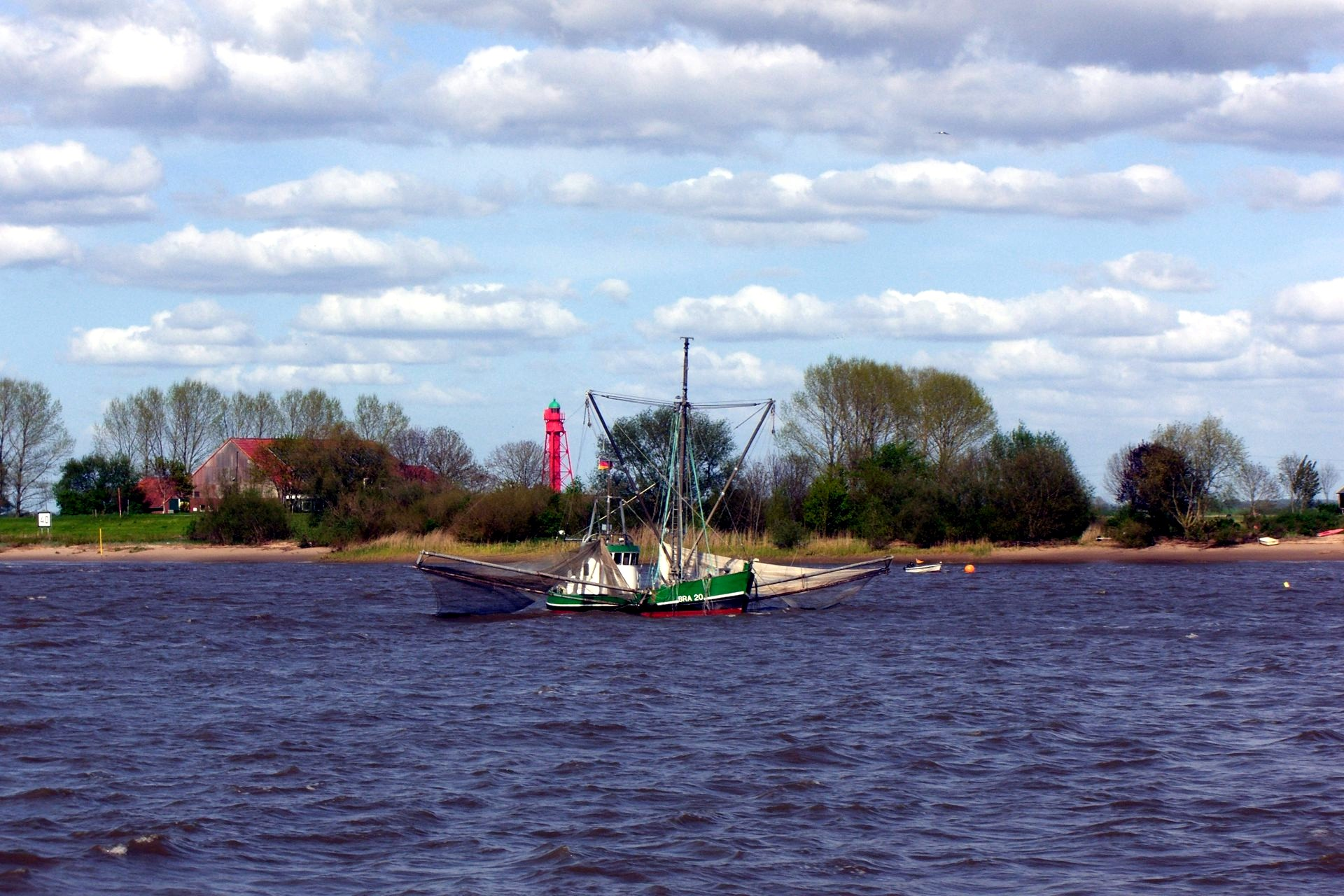 FFH-Gebiet „Unterweser“. DE-2617-401